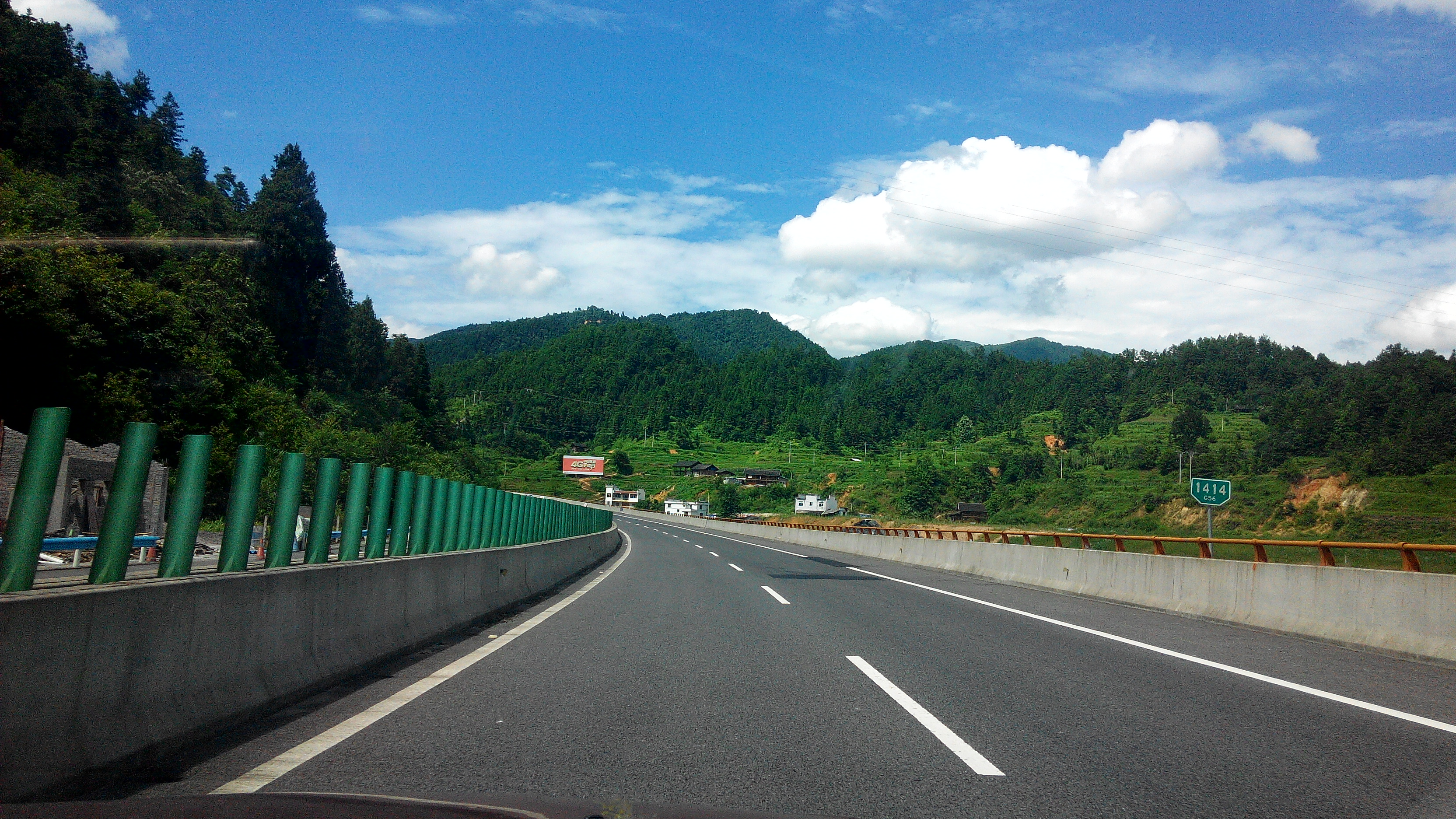 中国高速G56铜仁德旺段 瑞丽方向 1414公里处